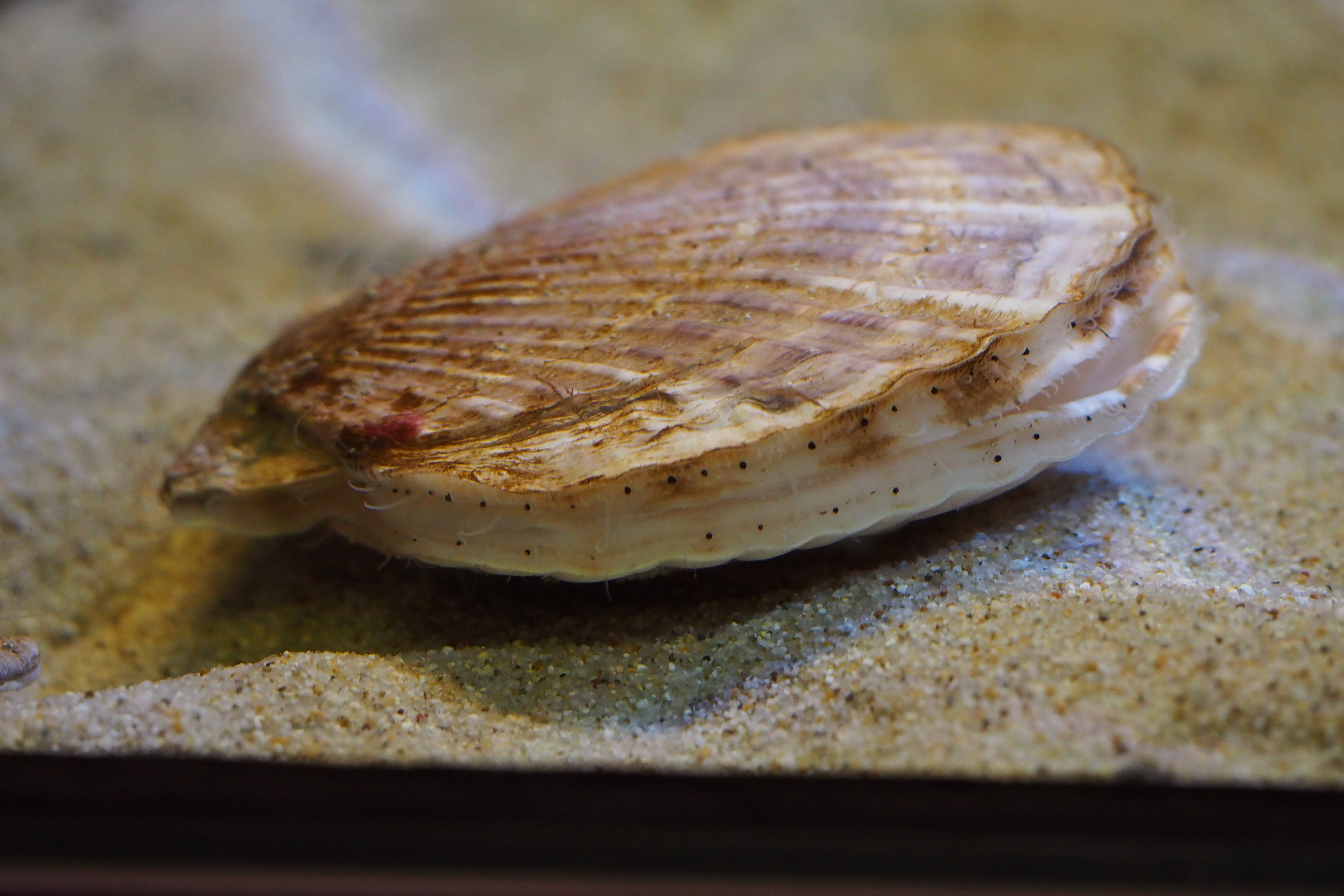 living ホタテガイ. at Suma aquarium.